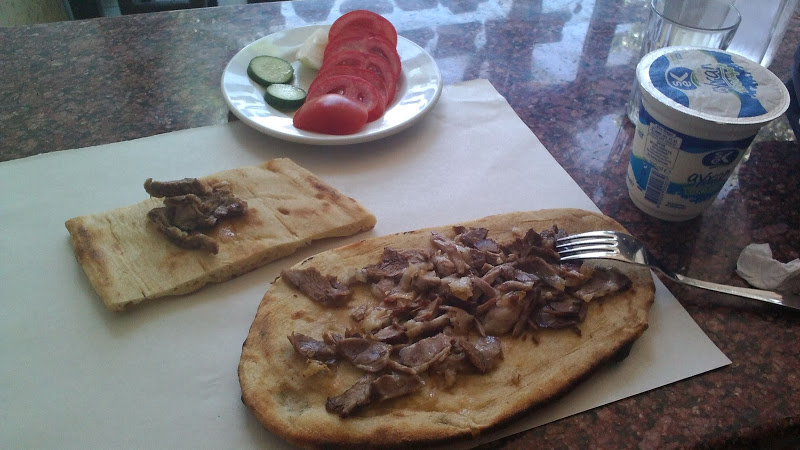 Siirt ilinde Büryan kebap salonunda görüntülenmiş Büryan kebabı.